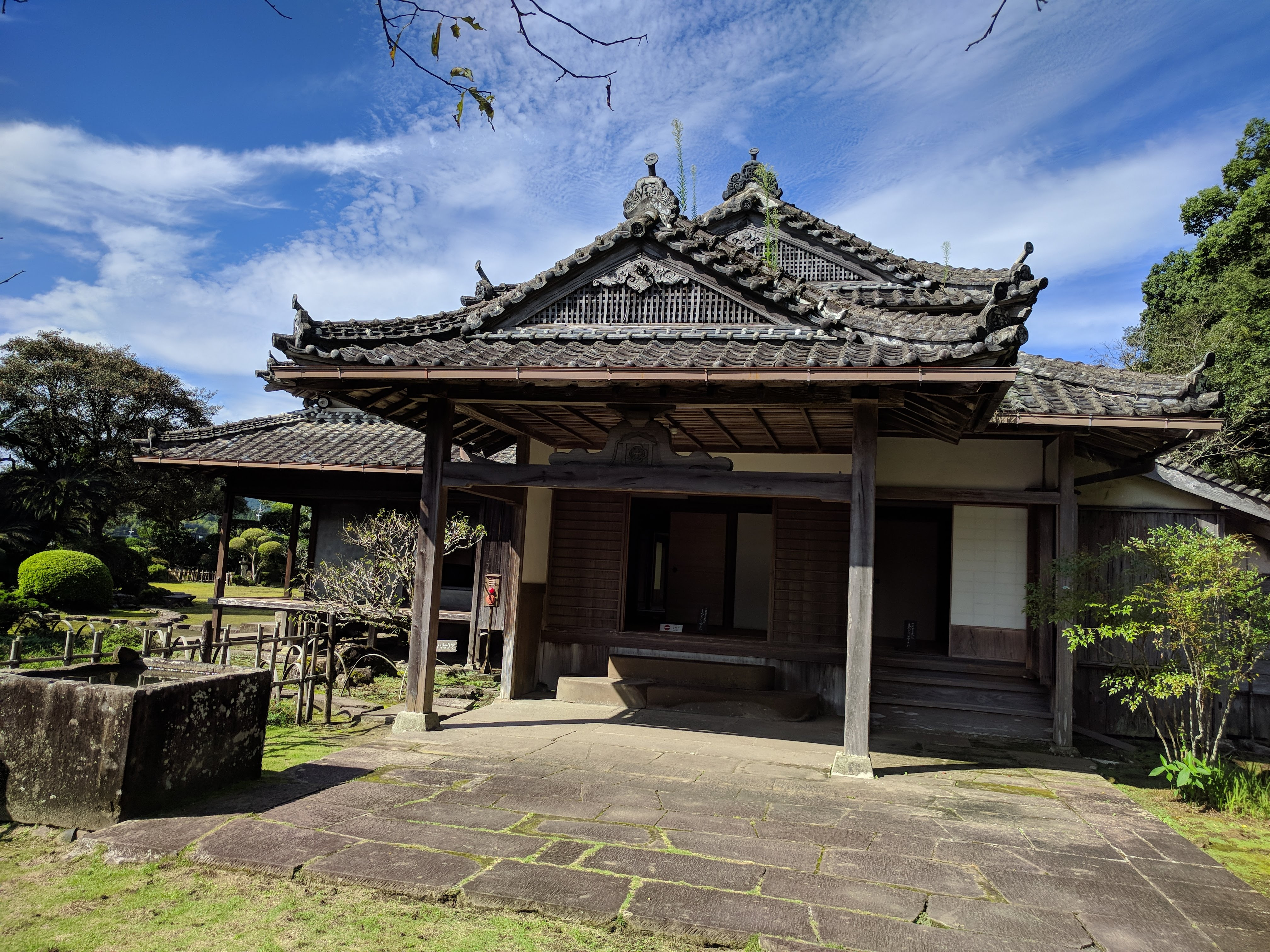 日南市豫章館の正面の画像